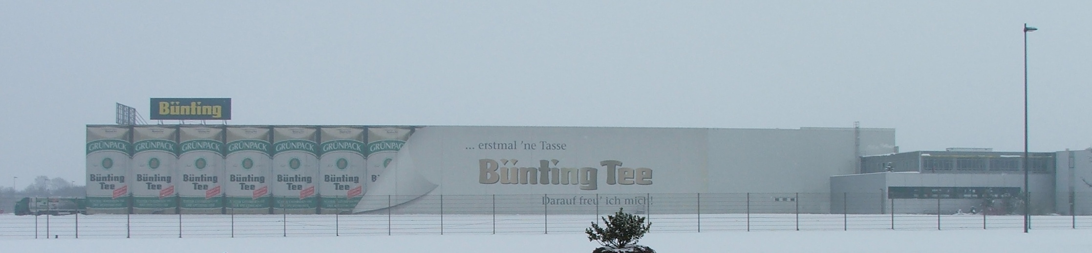 Buenting Zentrallager in Nortmoor bei Leer